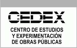 Logotipo del Centro de Estudios y Experimentación de Obras Públicas (CEDEX)